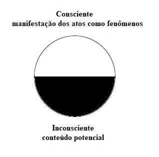 Representação esquemática de uma visualização para o consciente/inconsciente em termos de ato e potência